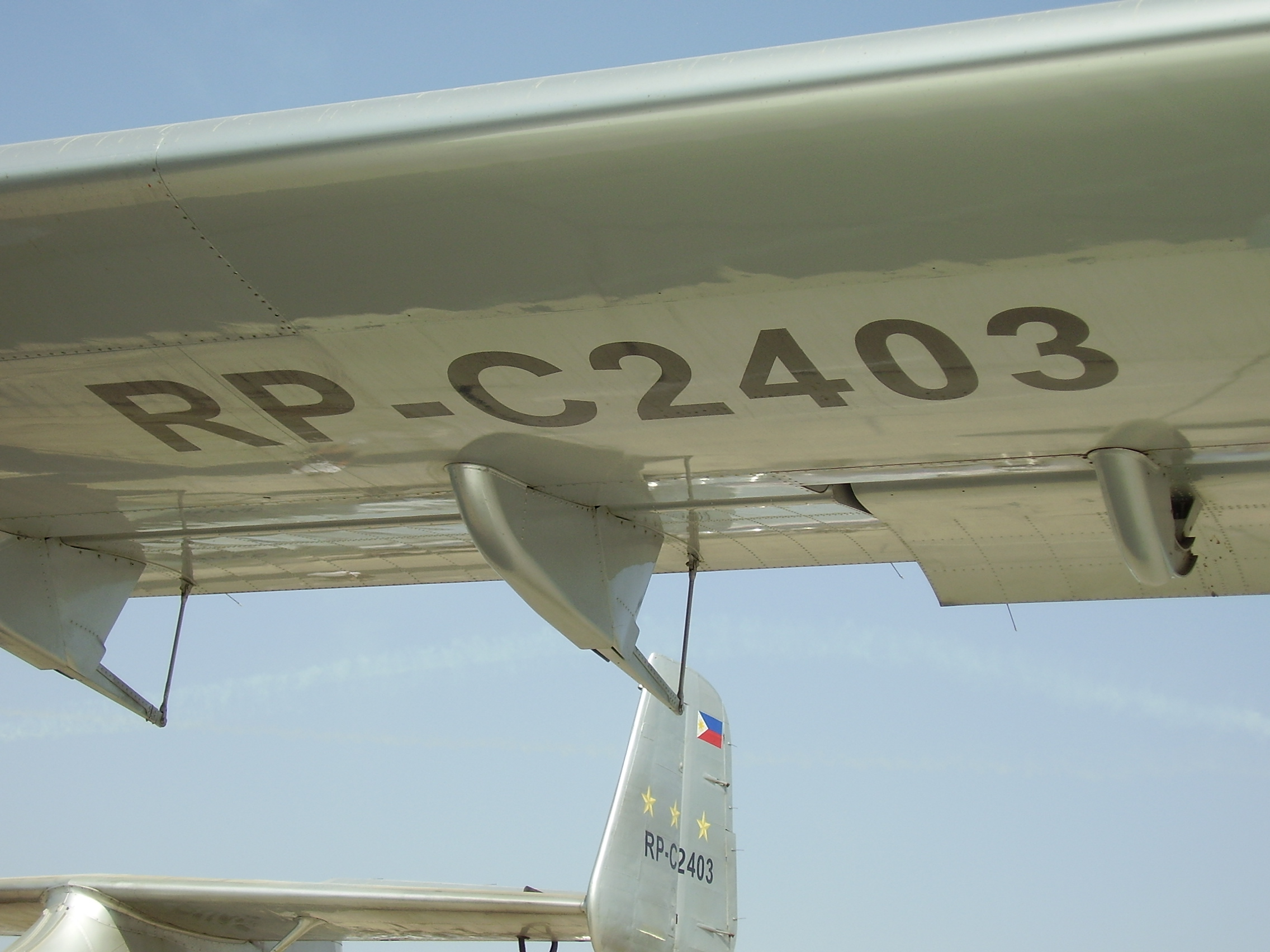 ILA 2008